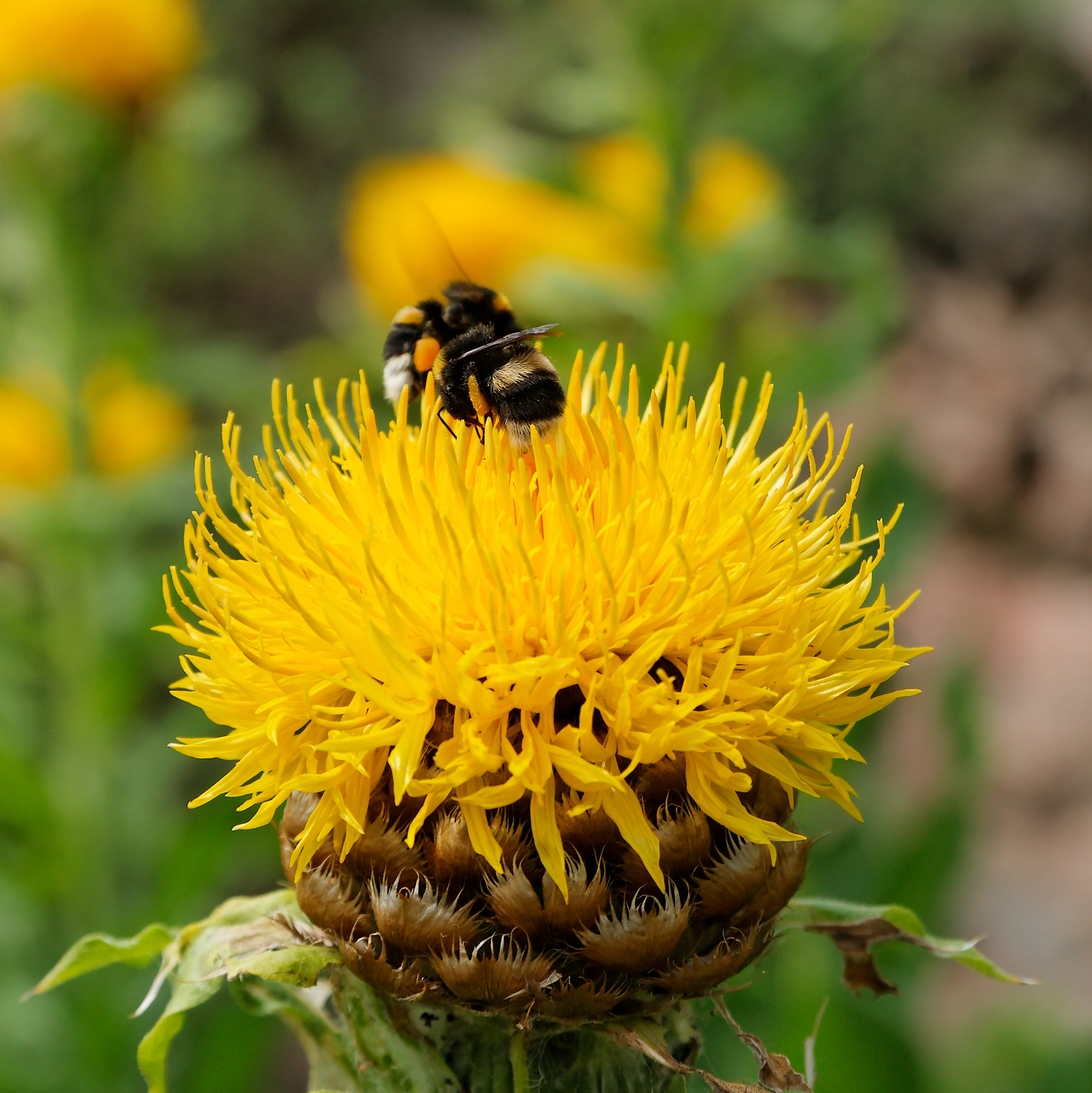 Centaurea macrocephala